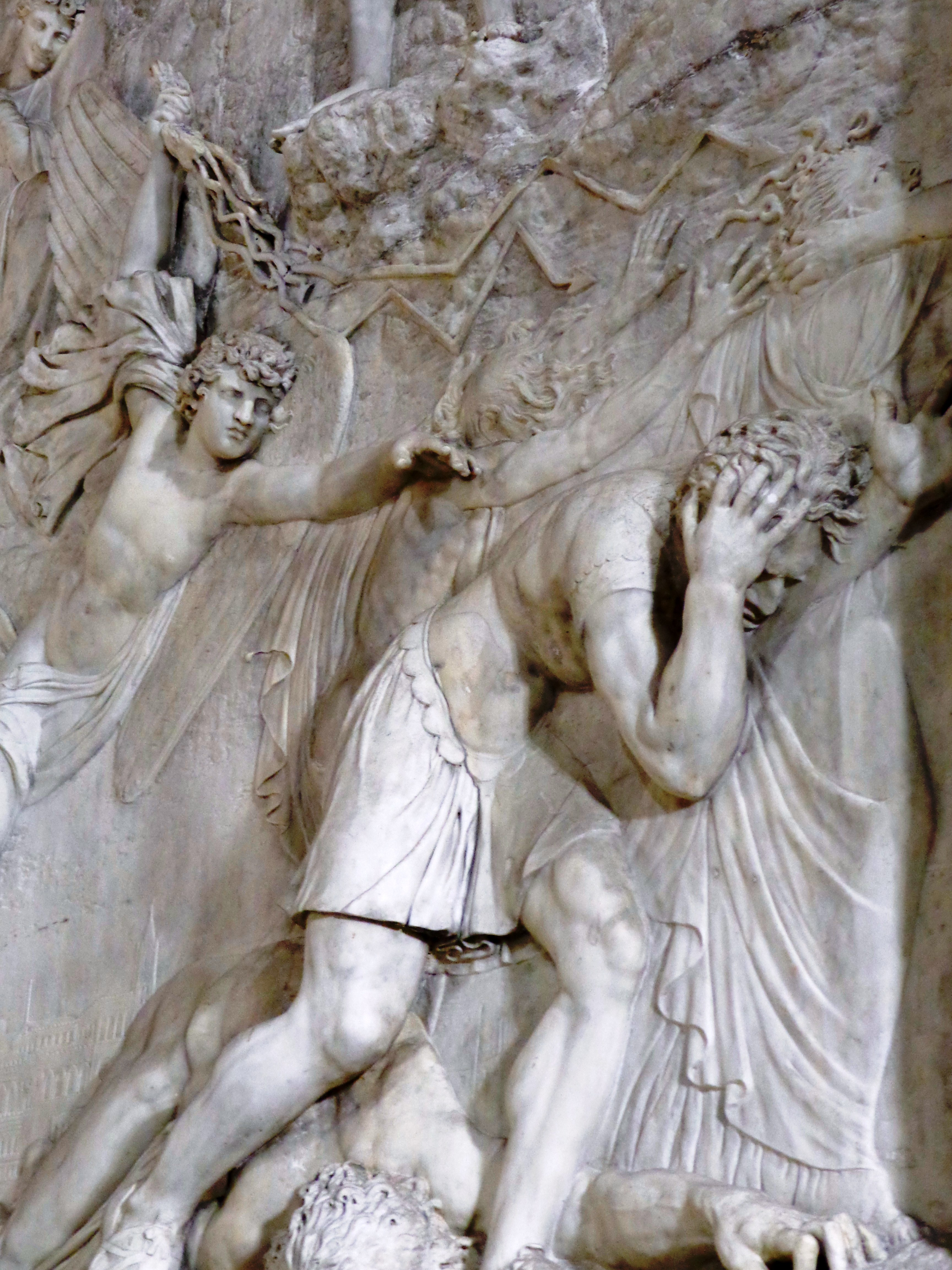 "'Santa Rosalia ferma il braccio all'angelo della morte'", altorilievo